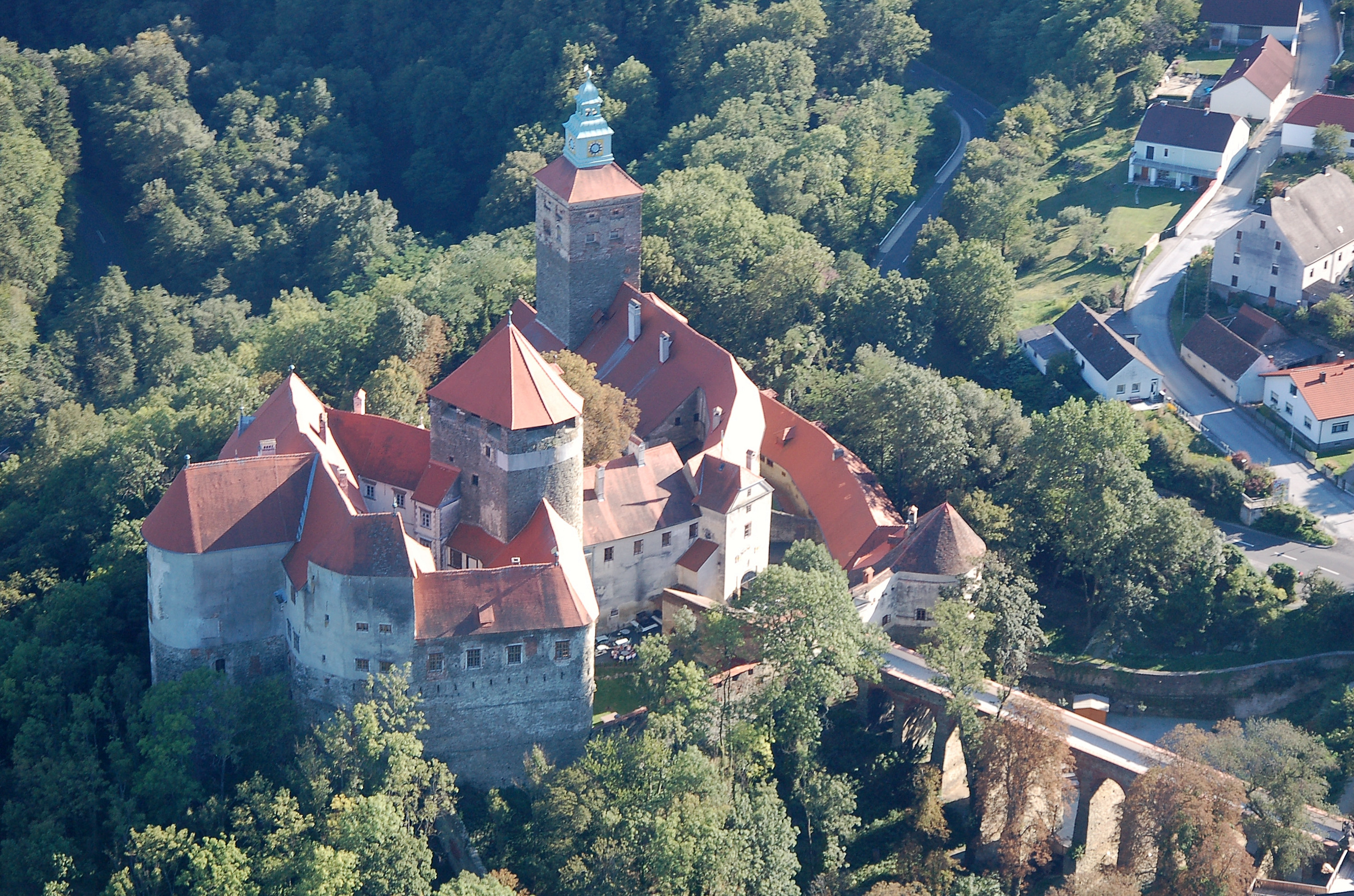 Burg Schlaining mit Mauer und Graben